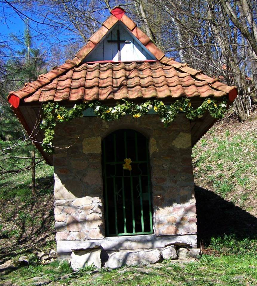 Dolina Będkowska (Dolinki Krakowskie)